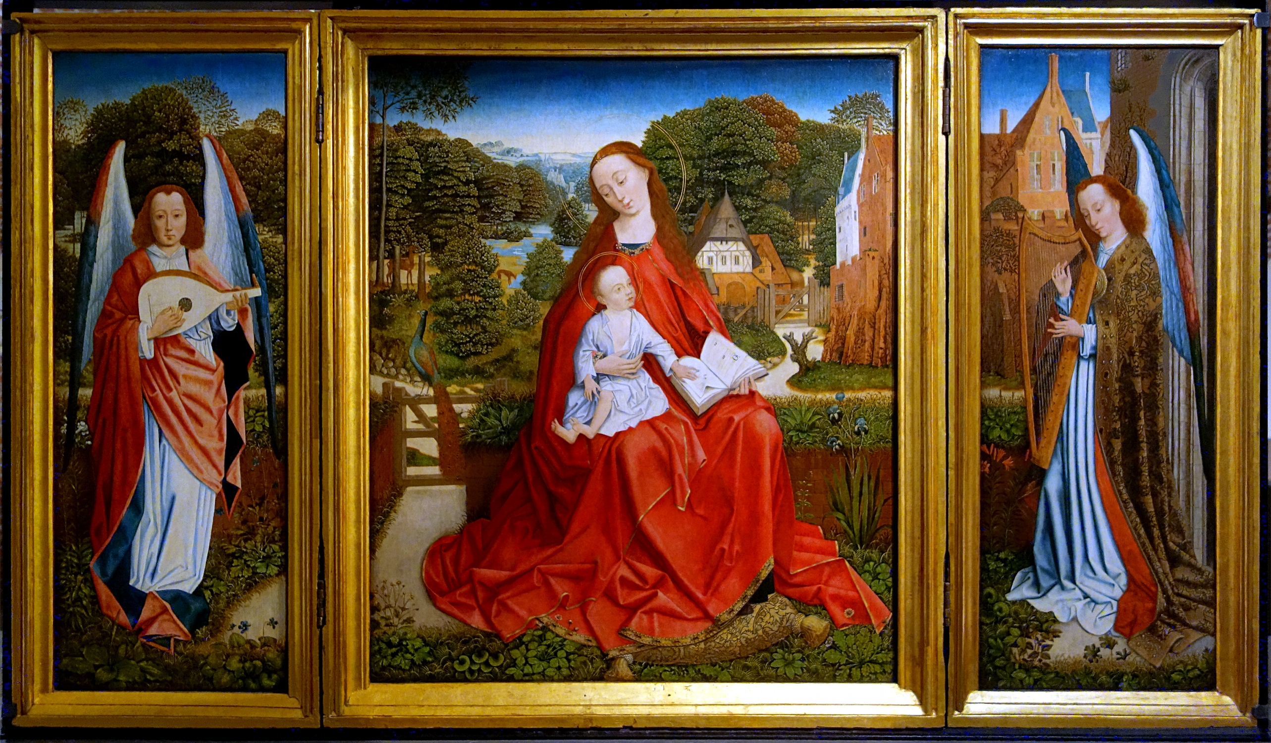 Triptyque de la Vierge à l'enfant entourée d'anges musicienslabel QS:Lfr,"Triptyque de la Vierge à l'enfant entourée d'anges musiciens"